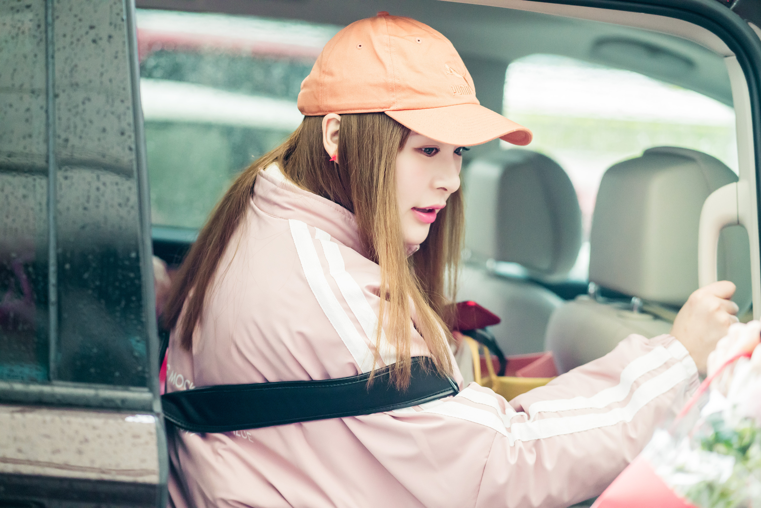 2018.1.6 广州白云机场~ (张语格)